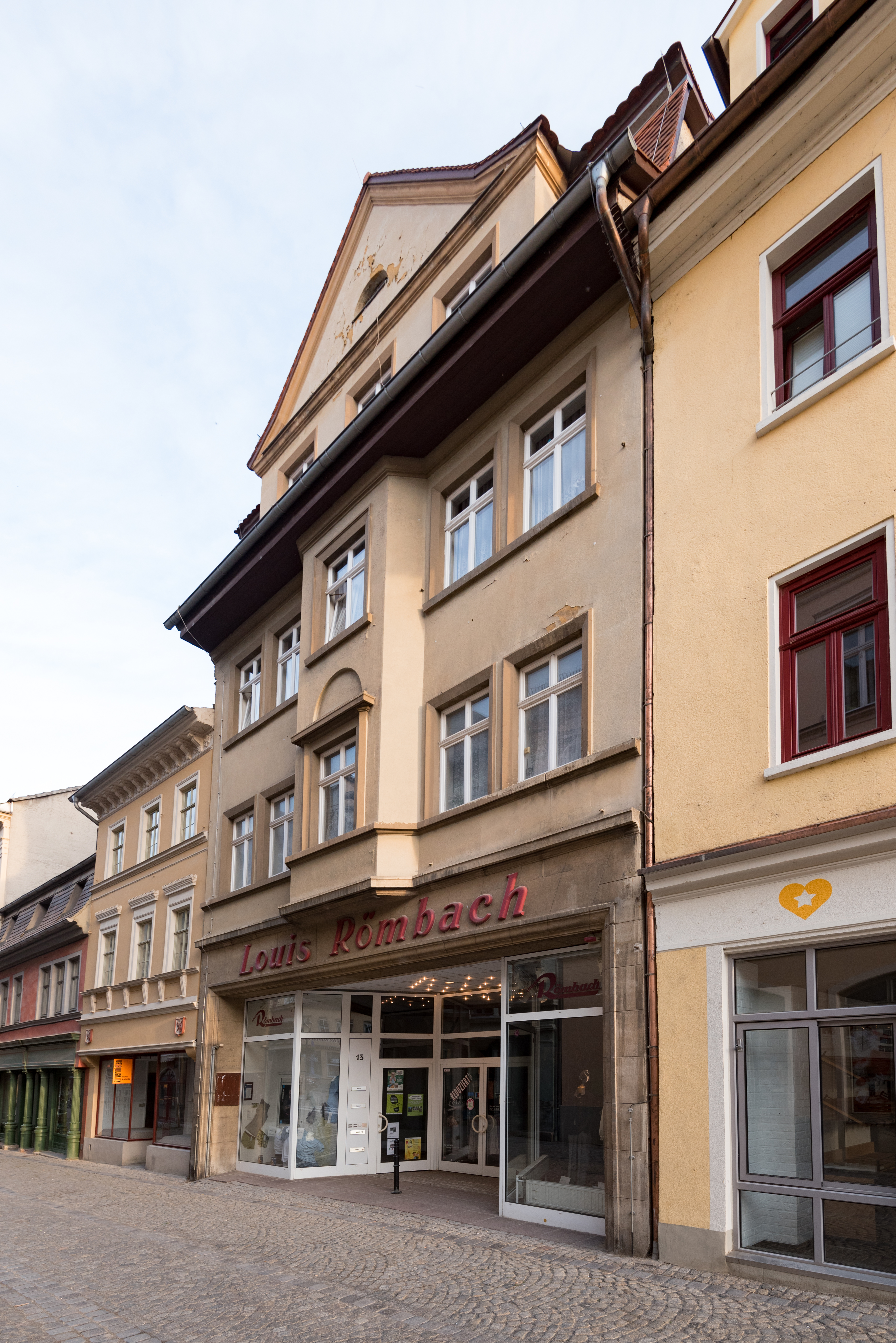 Naumburg (Saale), Herrenstraße 13